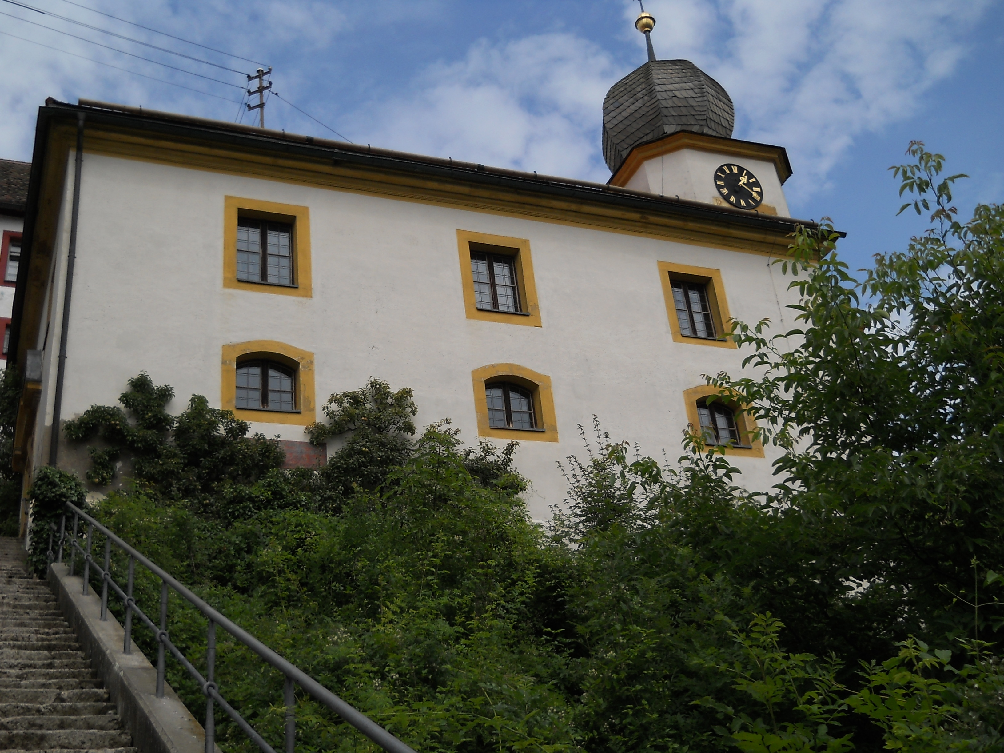 Egloffstein in der Fränkischen Schweiz, Pfarrkirche St. Bartholomäus von 1750/52